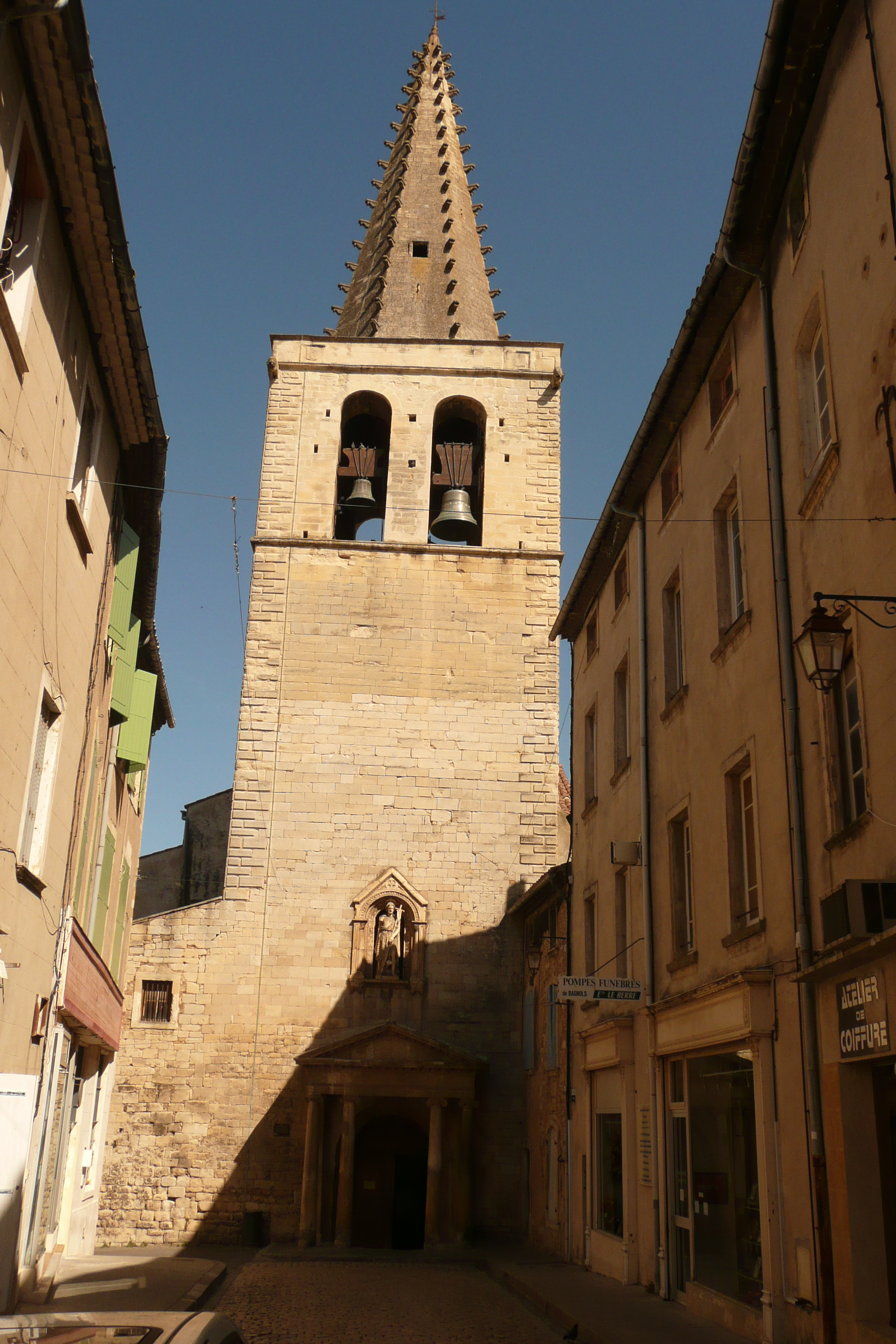 Eglise à Bagnols-sur-Cèze.